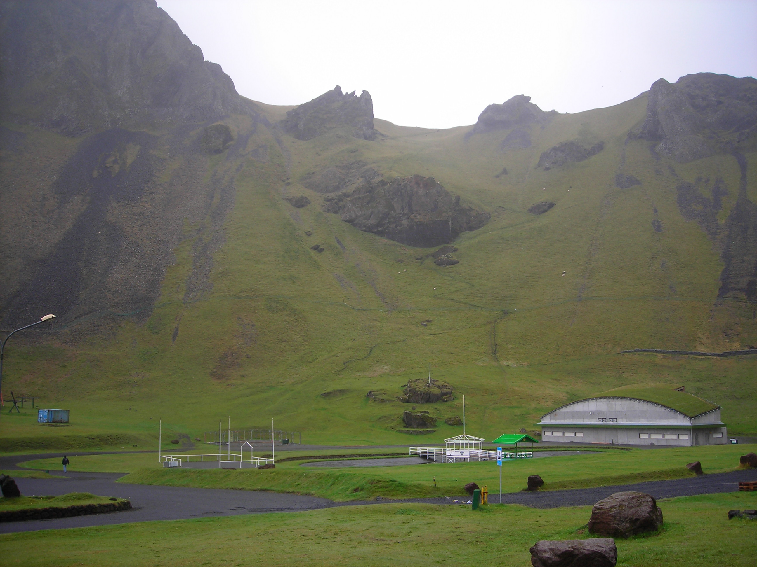 Vestmannaeyjar - Herjólfsdalur